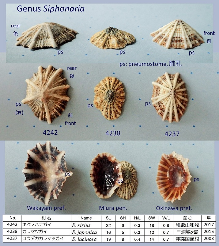 紀伊半島のキクノハナ、三浦半島のカラマツ、沖縄のコウダカカラマツ。